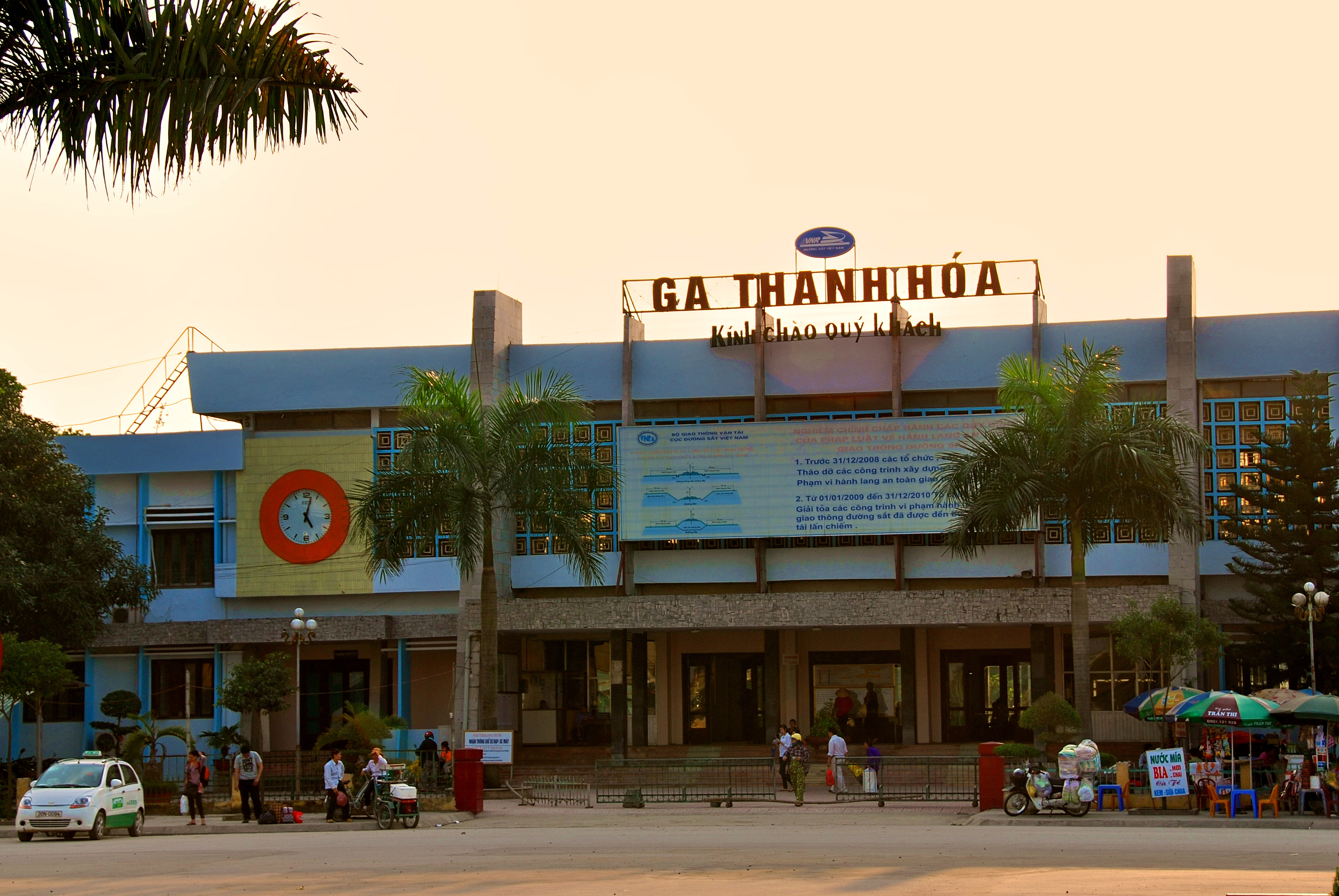 Железнодорожный вокзал в городе Тханьхоа